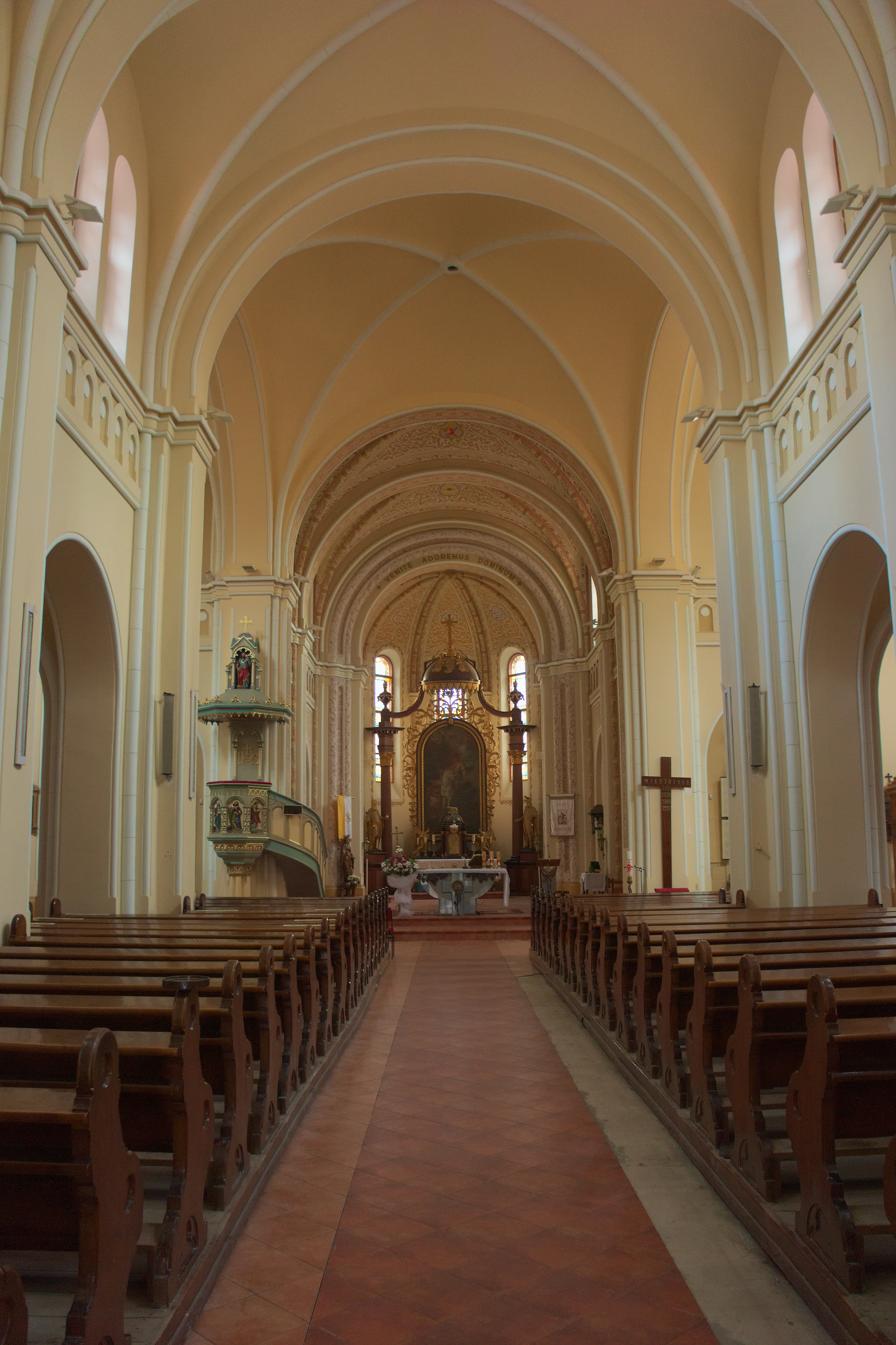 RAW